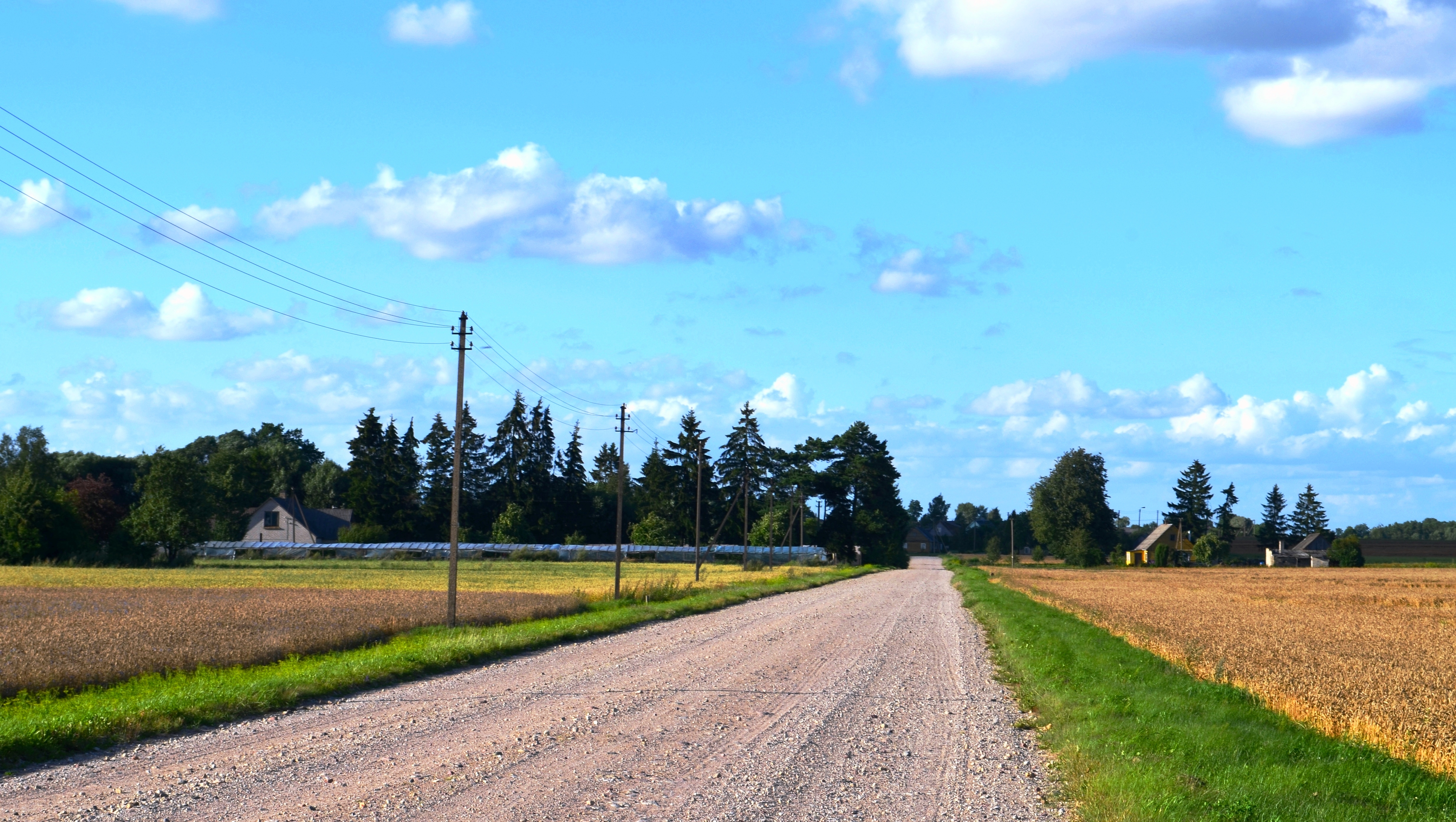 Lalai, Kėdainių raj.